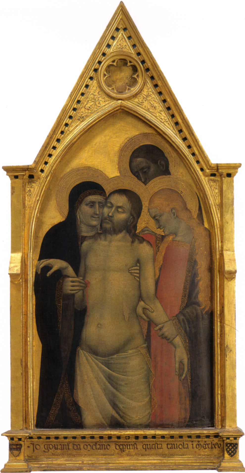 Giovanni da milano, pietà